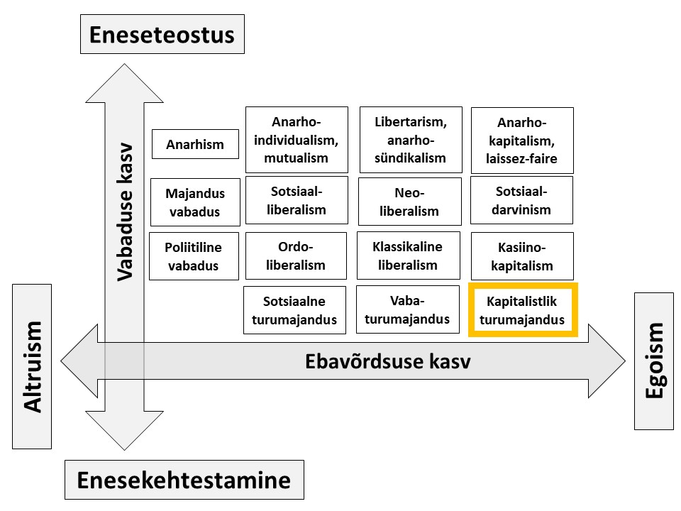 Turumajanduse üks lahendustest